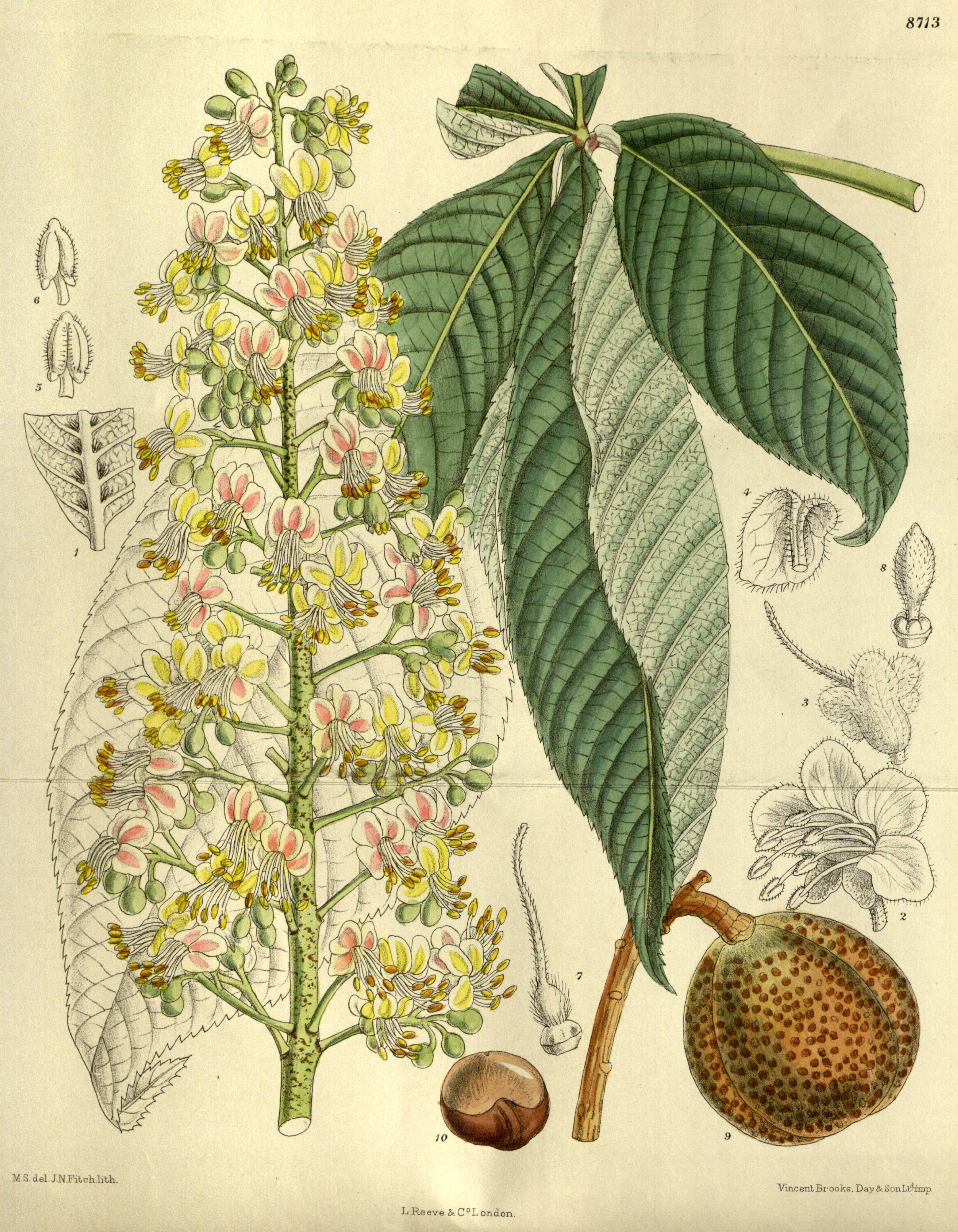 Aesculus turbinata, Sapindaceae